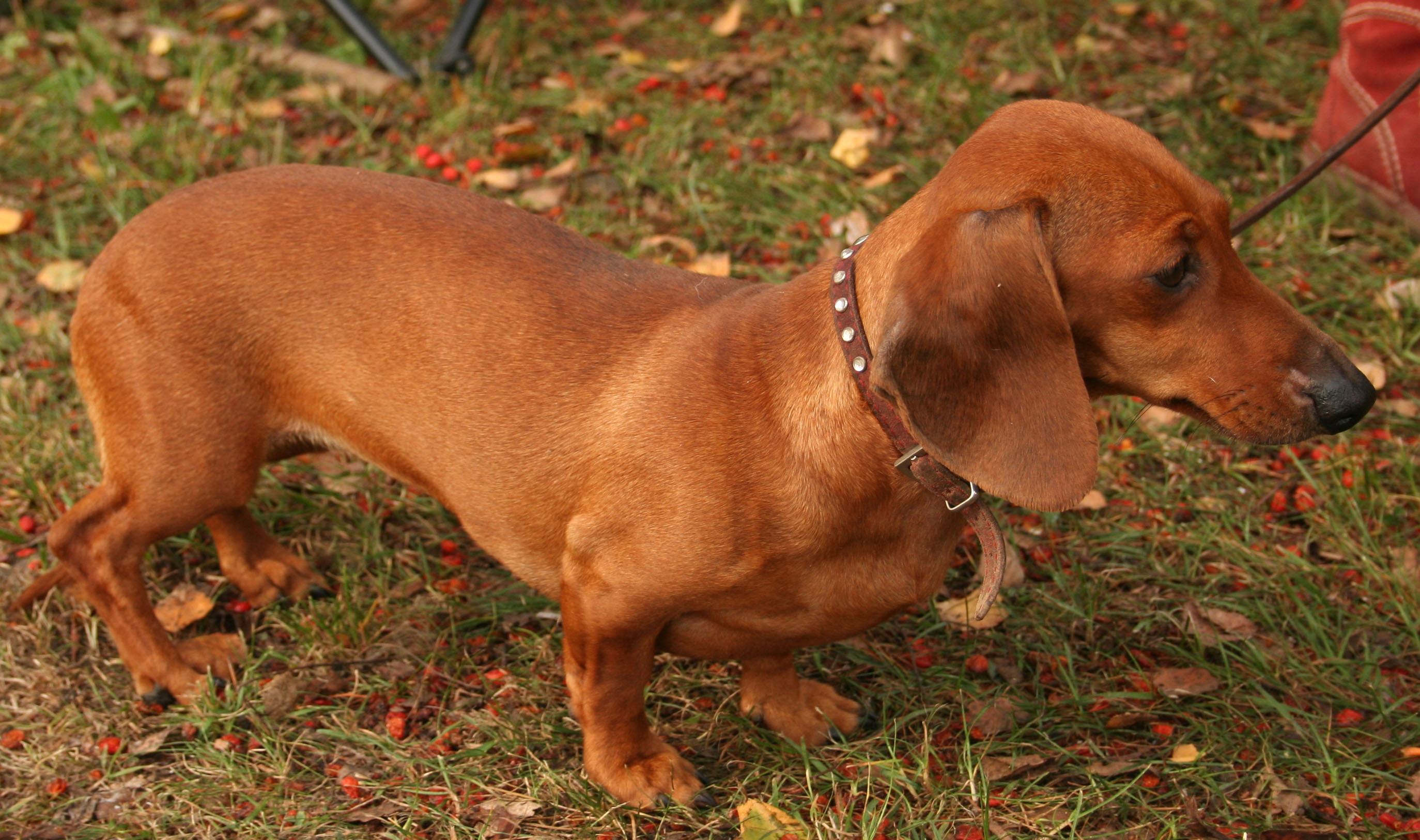 Jamnik króliczy gładkowłosy na wystawie krajowej w Rybniku - Kamineiu